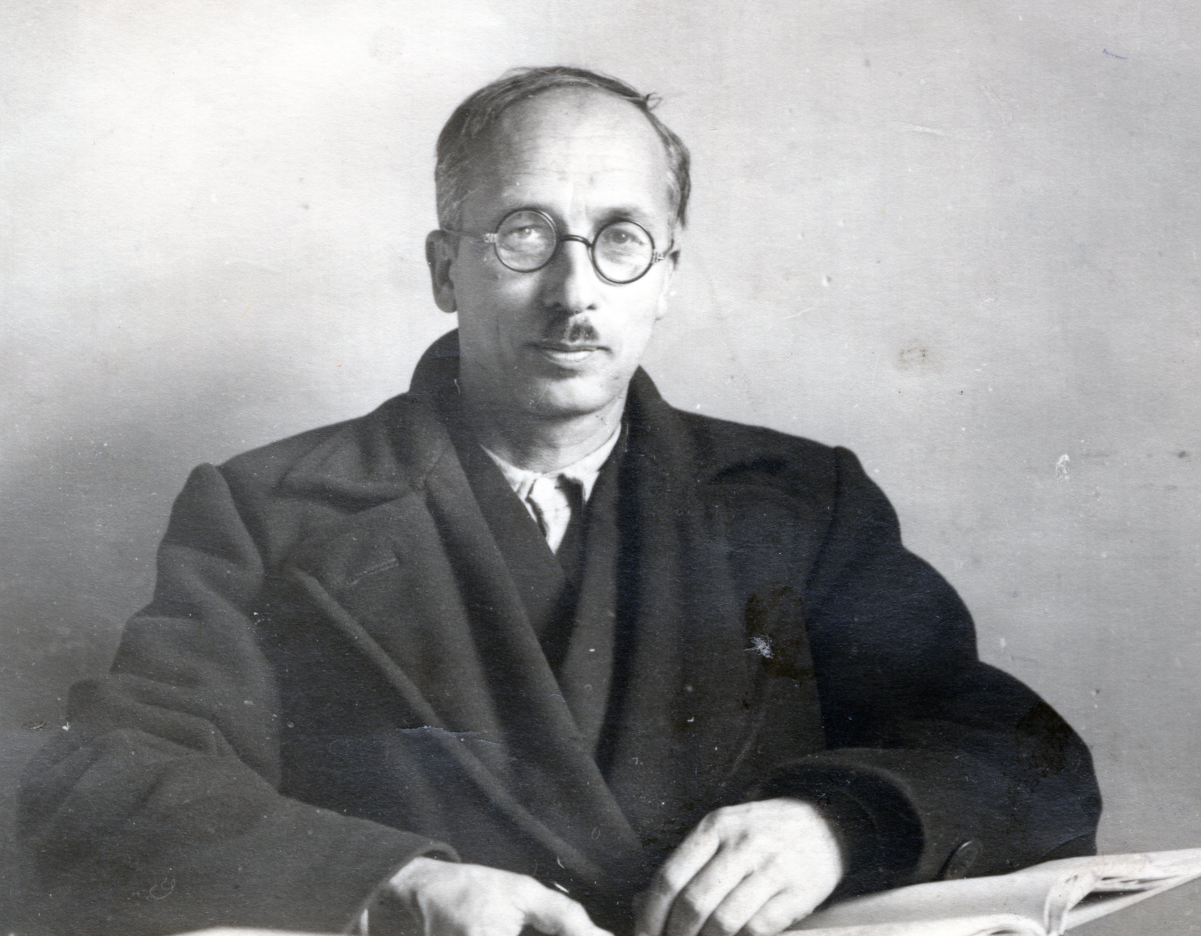 из архива Аleksandra Aghababyan